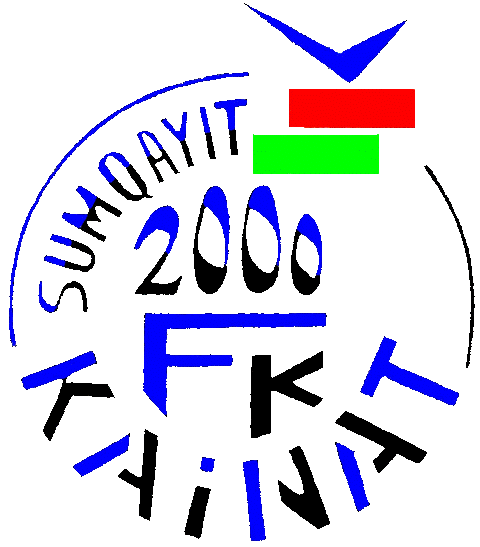 FK Kainat Sumqayıt